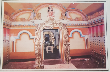 ஆலய மகா மண்டப முகப்புத் தோற்றம்